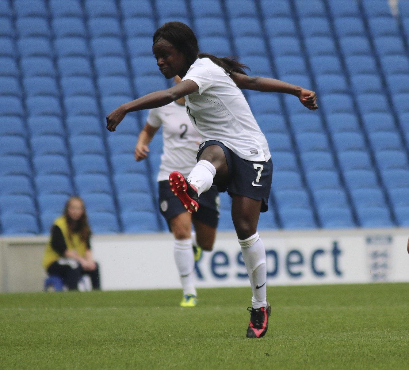 Eniola Aluko of England